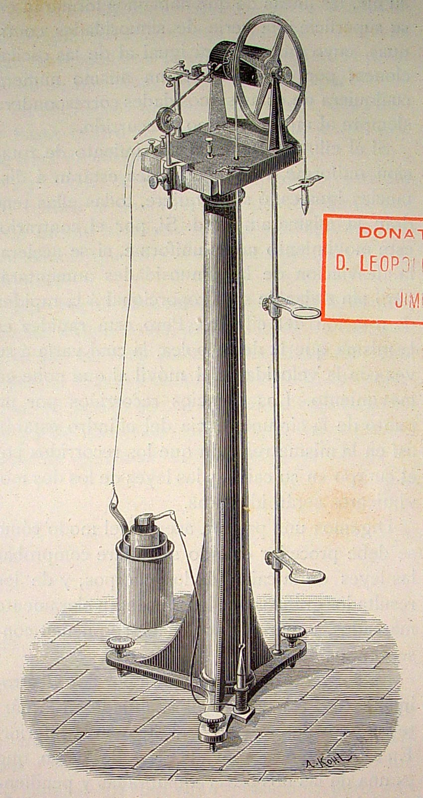 Ilustraciones pertenecientes al libro : El mundo físico : gravedad, gravitación, luz, calor, electricidad, magnetismo, etc. / A. Guillemin. - Barcelona Montaner y Simón, 1882